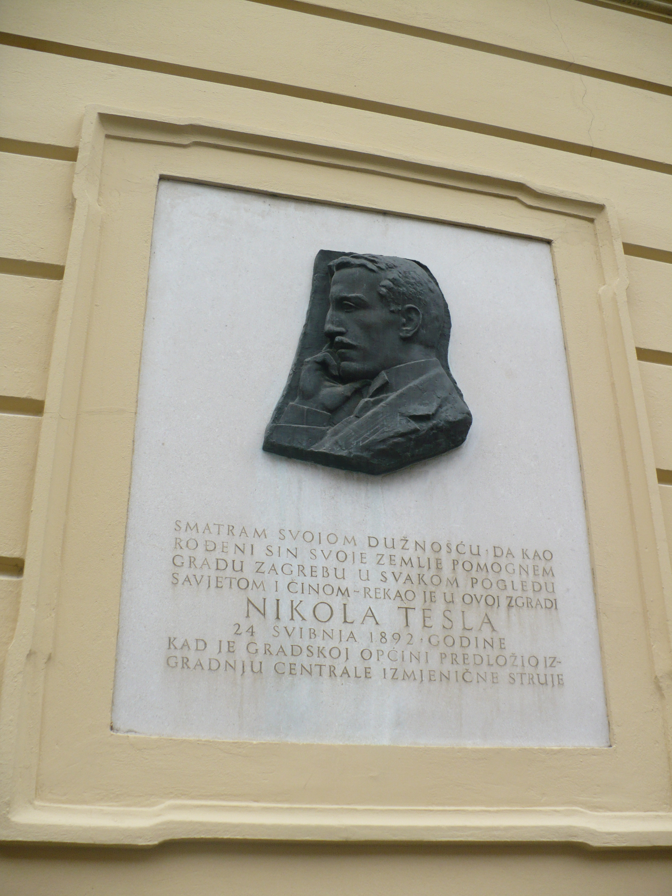 Zagreb, Hırvatistan